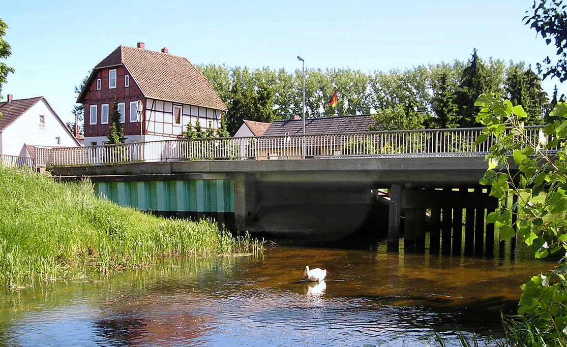 Bildbeschreibung: Vorsfelder Allerbrücke im Mai 2005 Quelle: Privatbesitz Vorsfelder 09:19, 8. Jun 2005 (CEST) Kategorie:Bild:Brücke